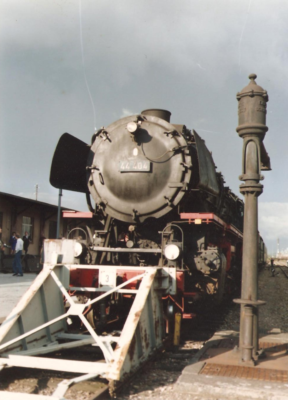 Güterzugdampflok 44 404 im Bahnhof Gütersloh Nord der Teutoburger Wald-Eisenbahn (TWE), Wasserkran und Prellbock stehen unter Denkmalschutz This is a photograph of an architectural monument. 192